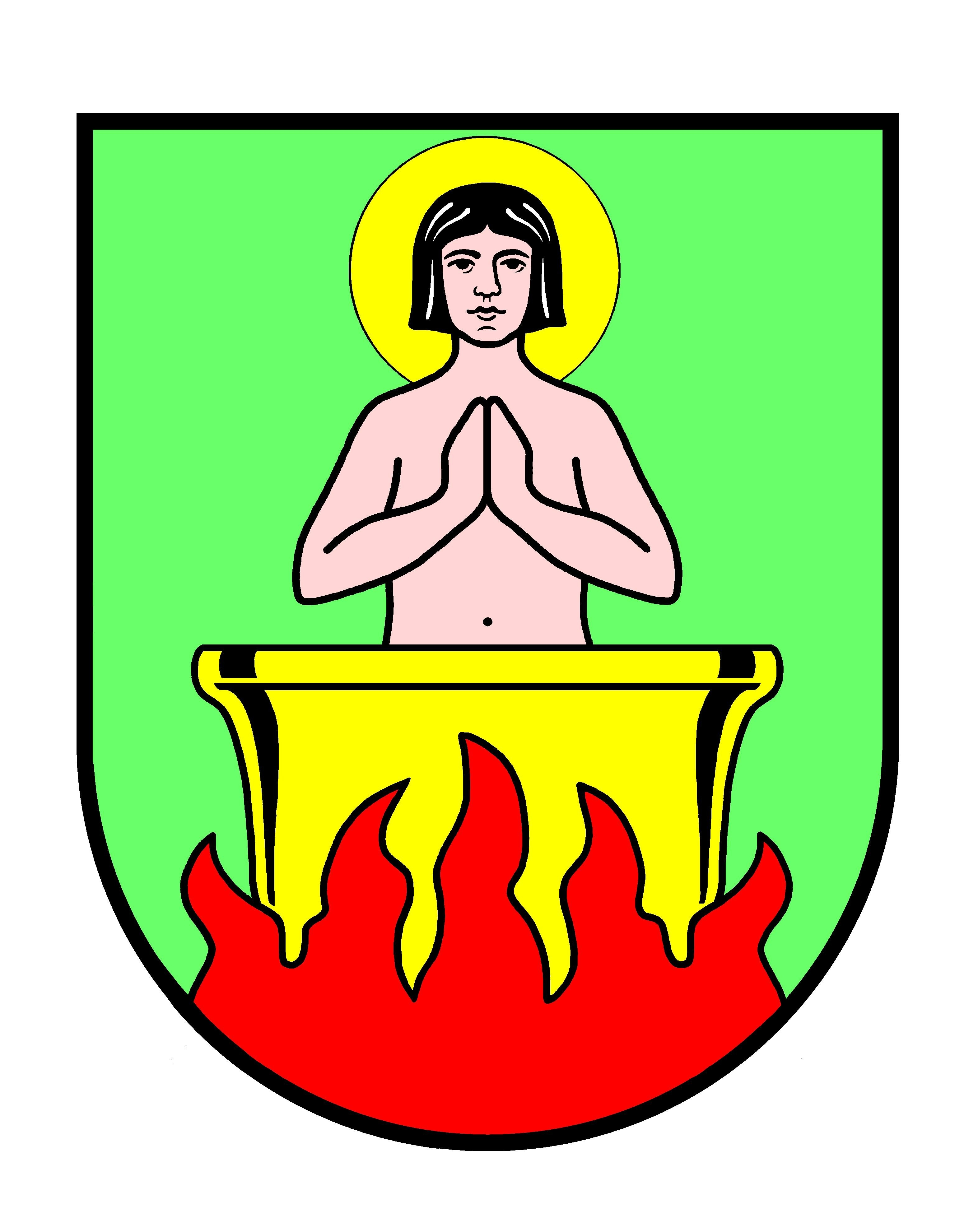 Wappen der Gemeinde Tüttleben